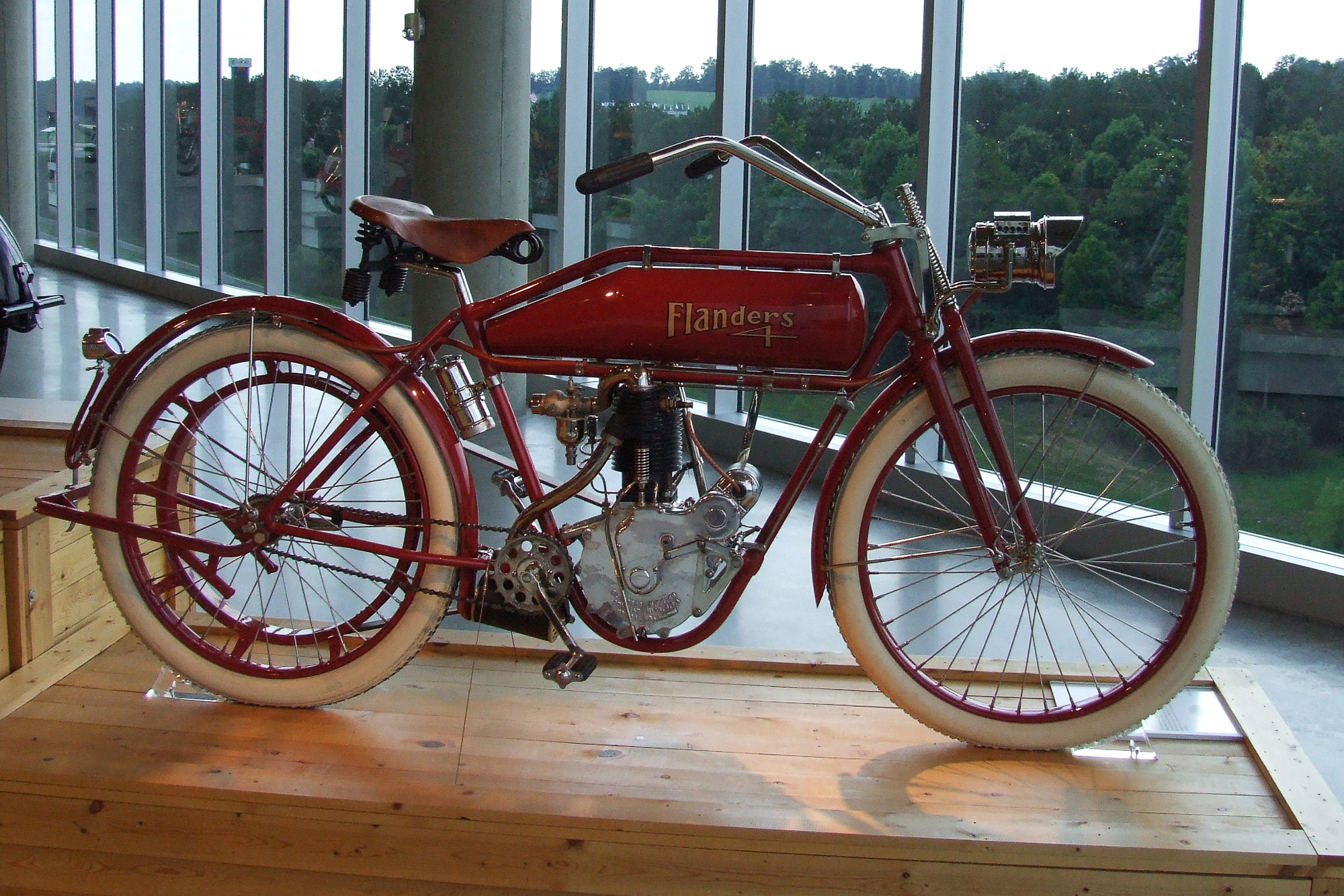 Flanders 4 (1911) im Barber Vintage Motorsports Museum, Birmingham Alabama USA